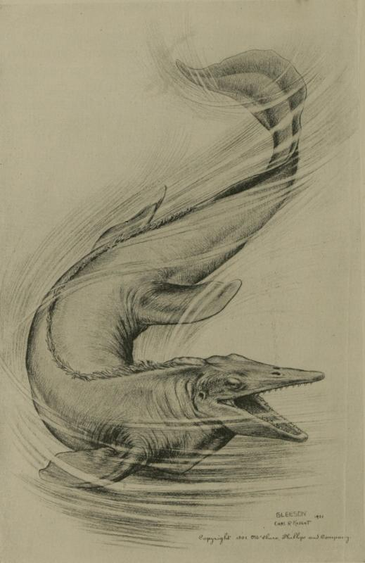 Tylosaurus.